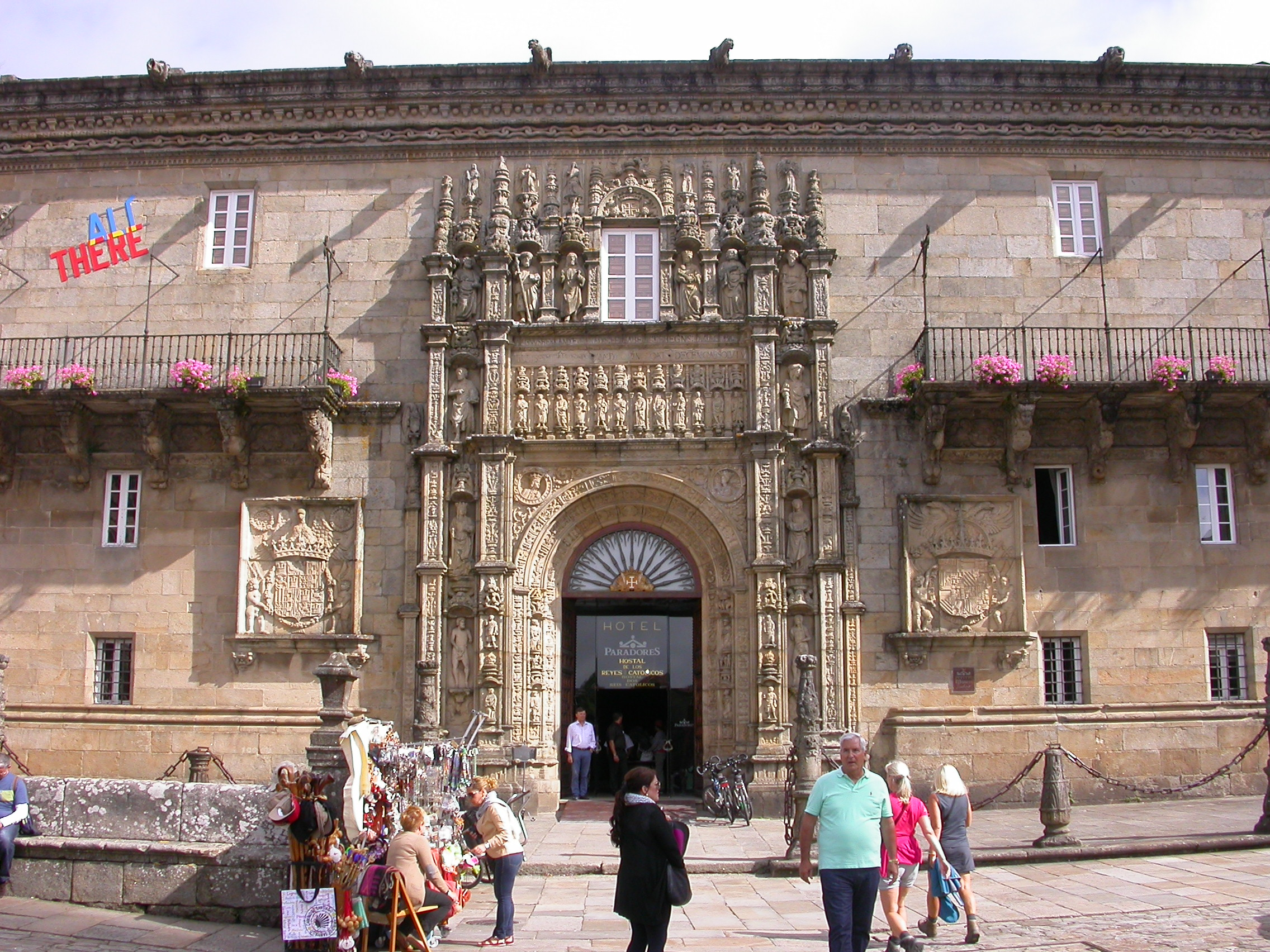 Parador de Santiago de Compostela, un edificio precioso del siglo XV.